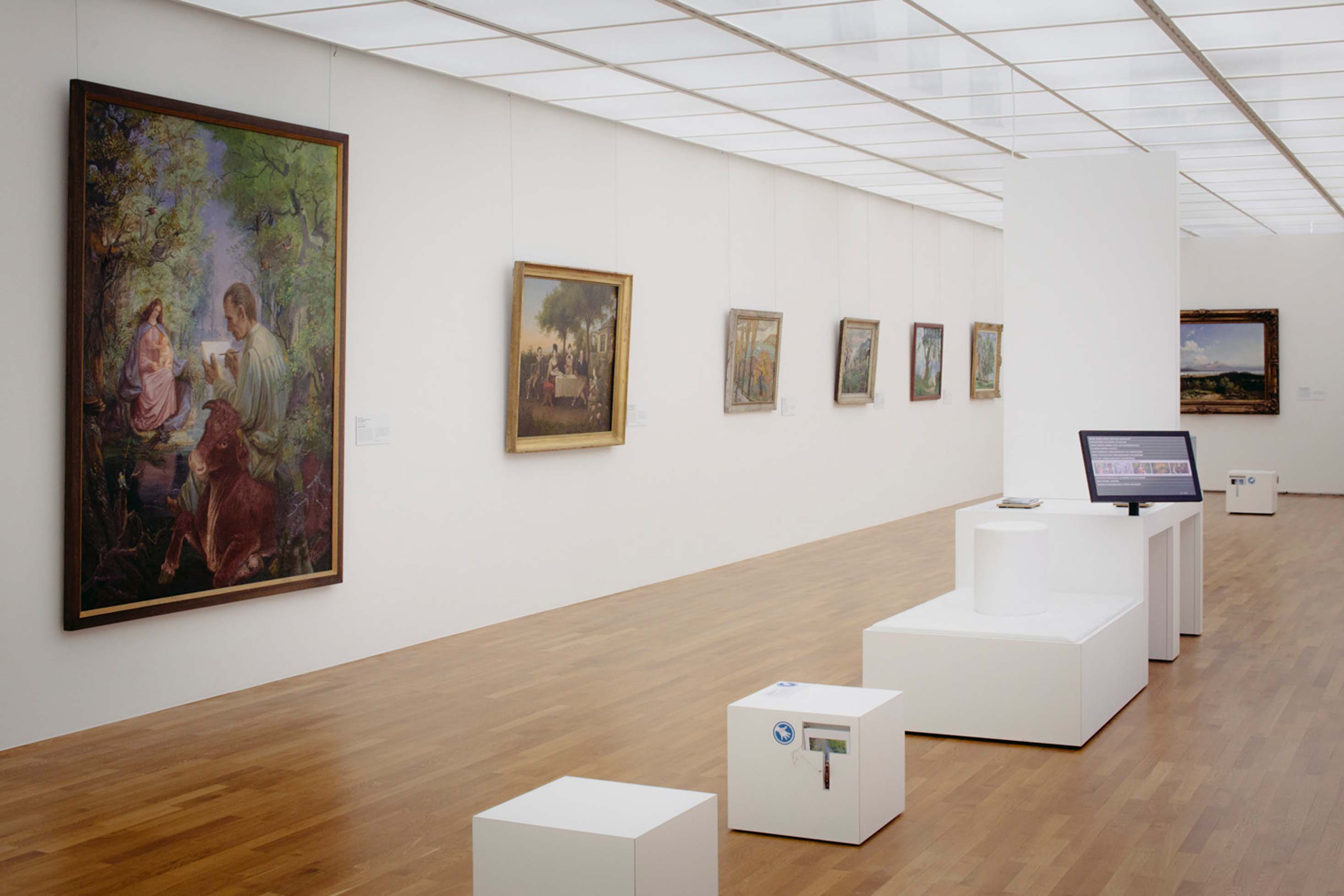 Kunstabteilung, Bereich "Mensch und Natur", © Zeppelin Museum, Foto: Myrzik